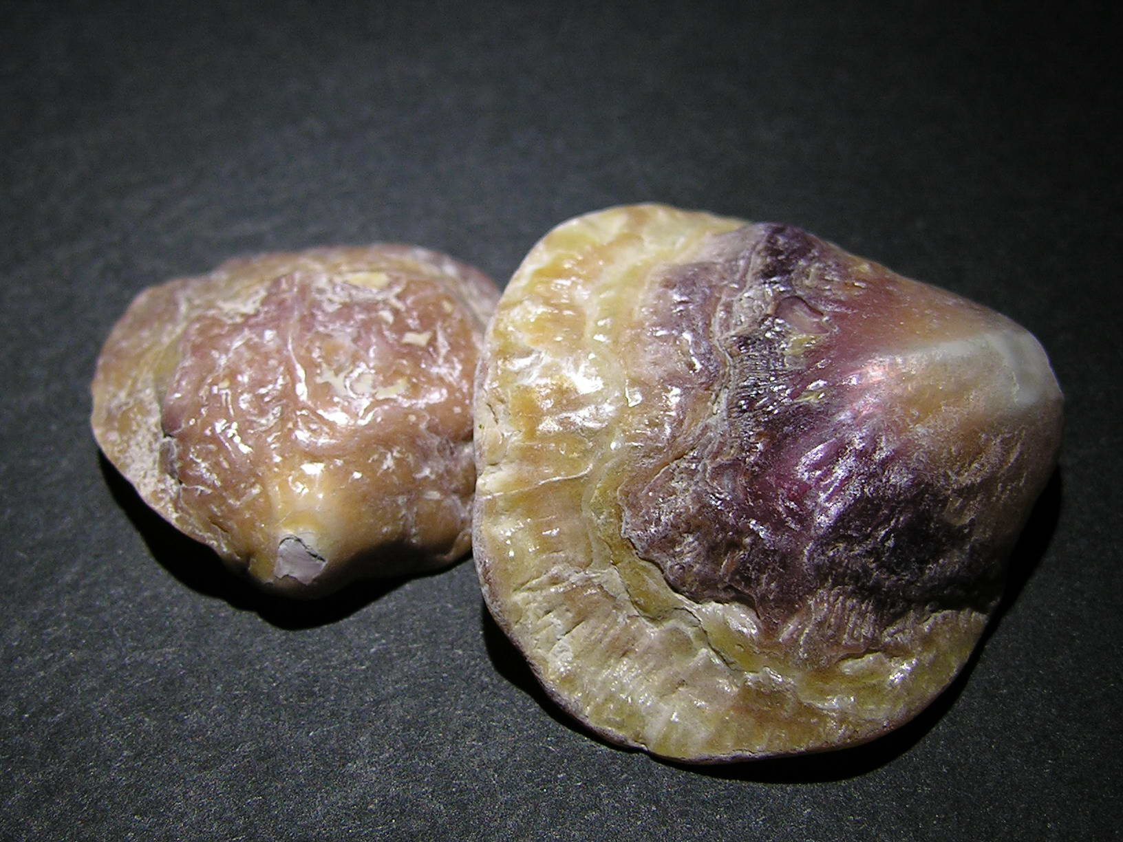 self made Ribeira - Galicia - Spain